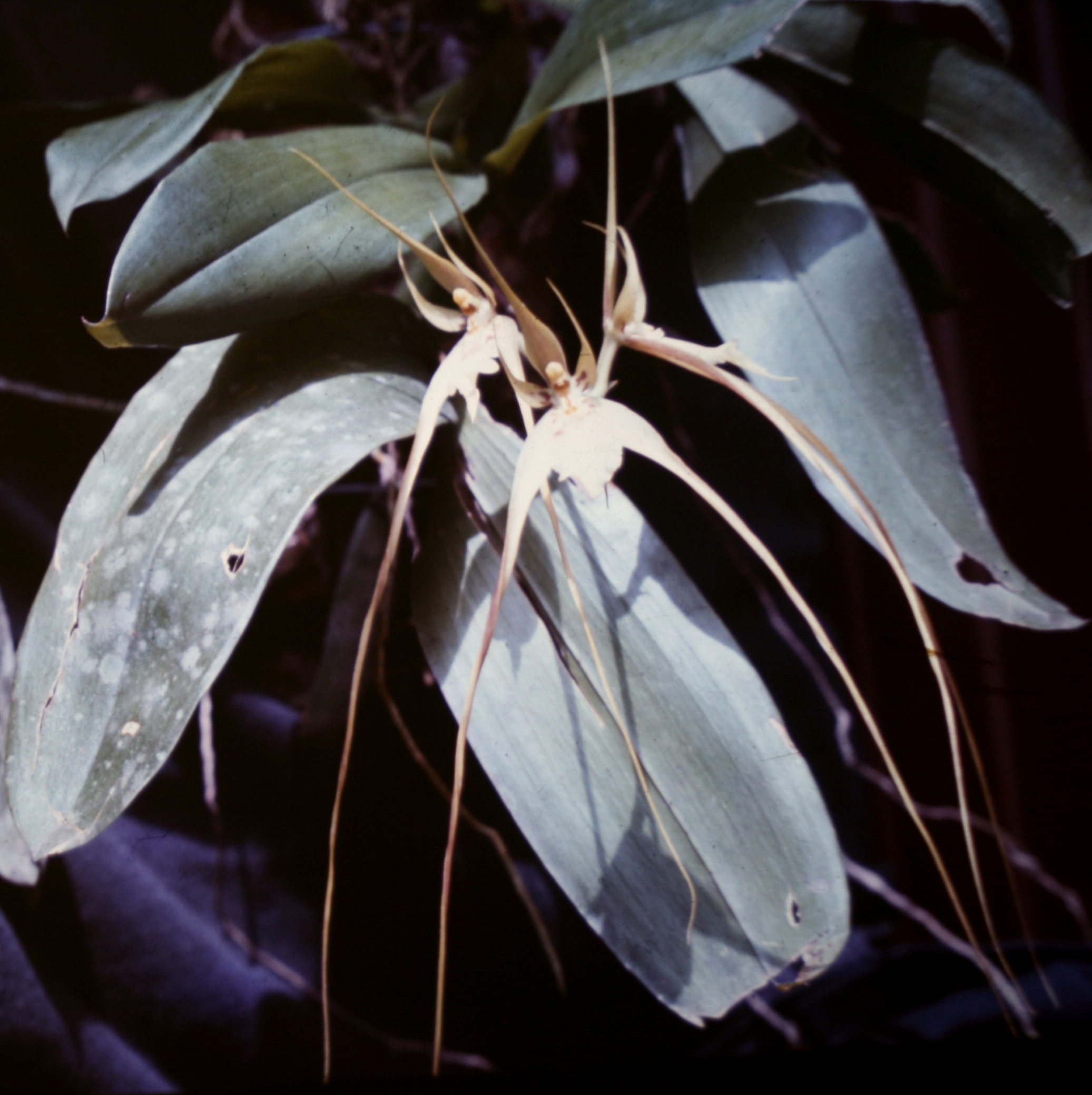 Brassia caudata, Suriname.